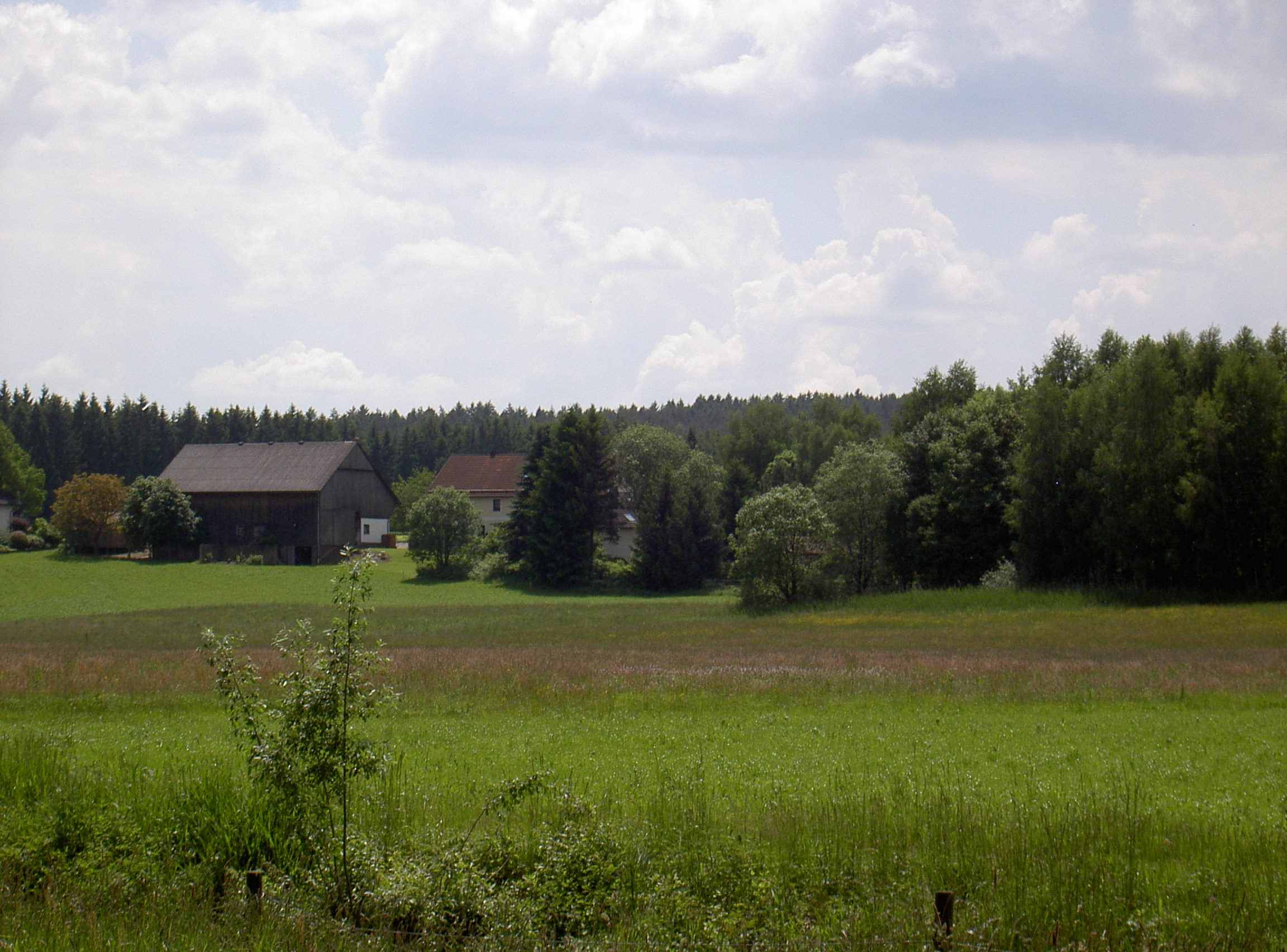 Grubhof